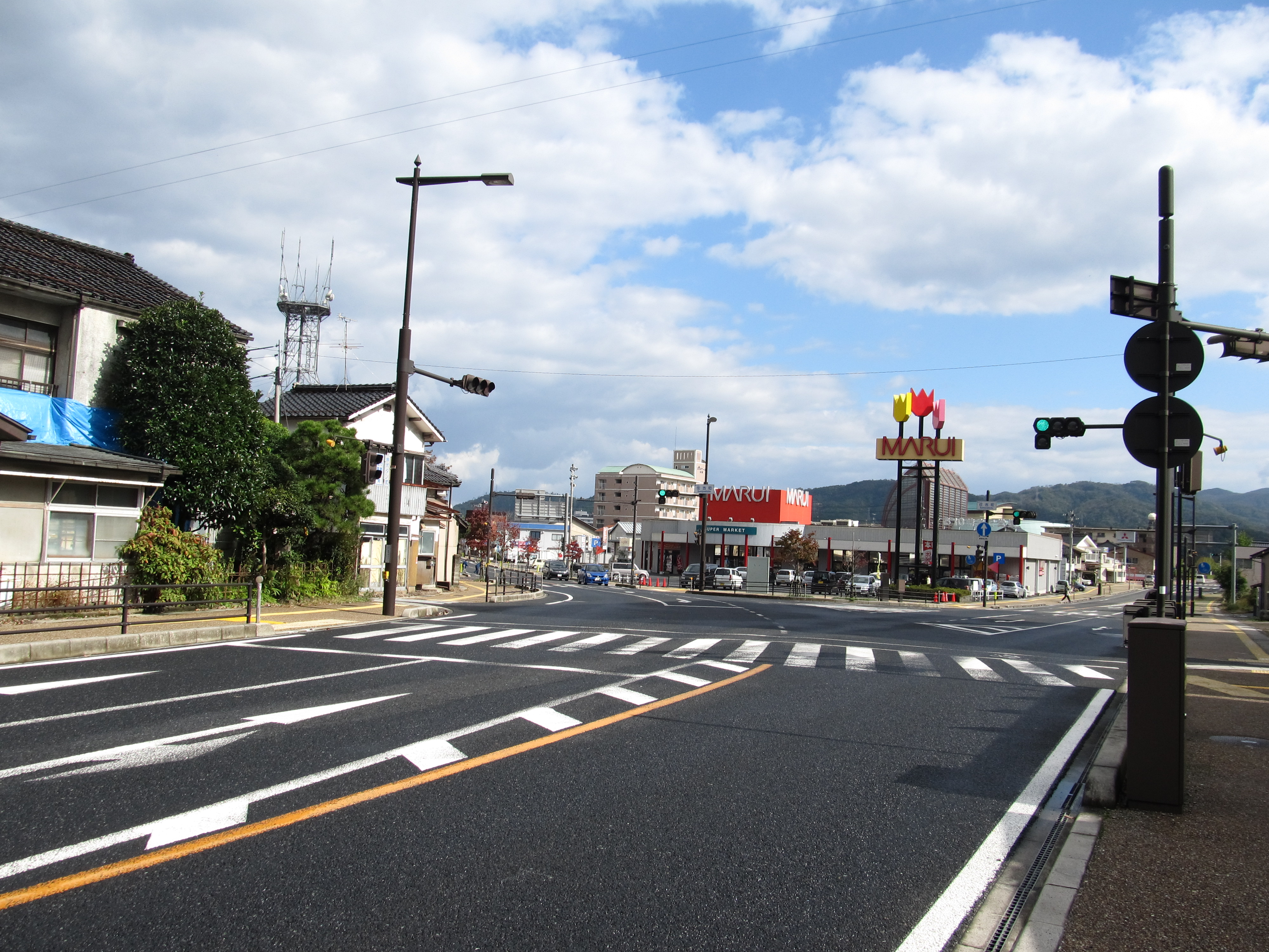 鳥取県倉吉市にある鳥取県道38号倉吉福本線・鳥取県道205号木地山倉吉線の住吉町交差点。